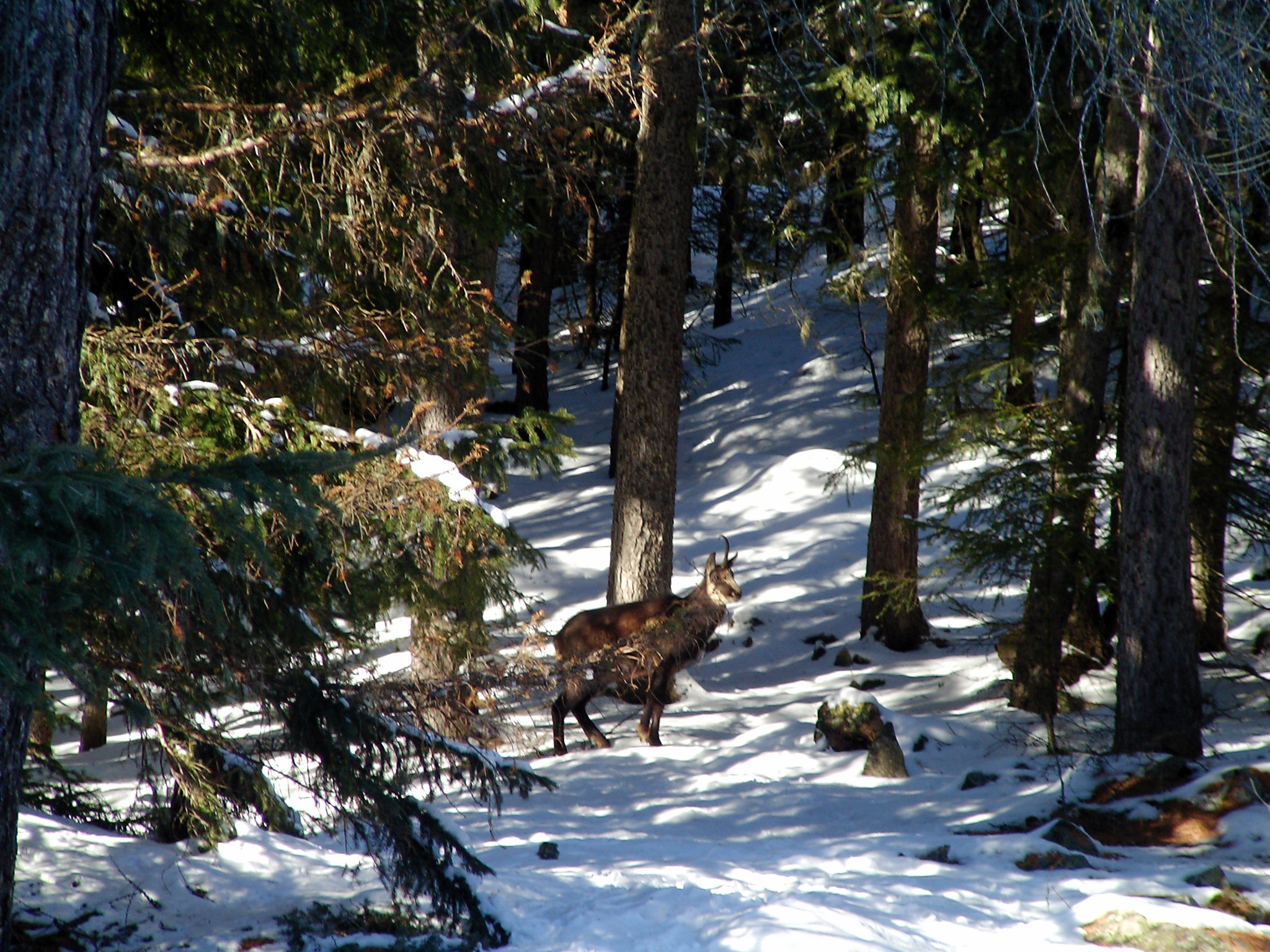 Un camoscio presso Cogne